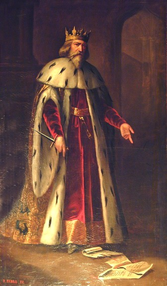 Retrato imaginario del rey Pedro IV de Aragón (1319-1387), que fue hijo del rey Alfonso IV de Aragón y de su primera esposa, la reina Teresa de Entenza.